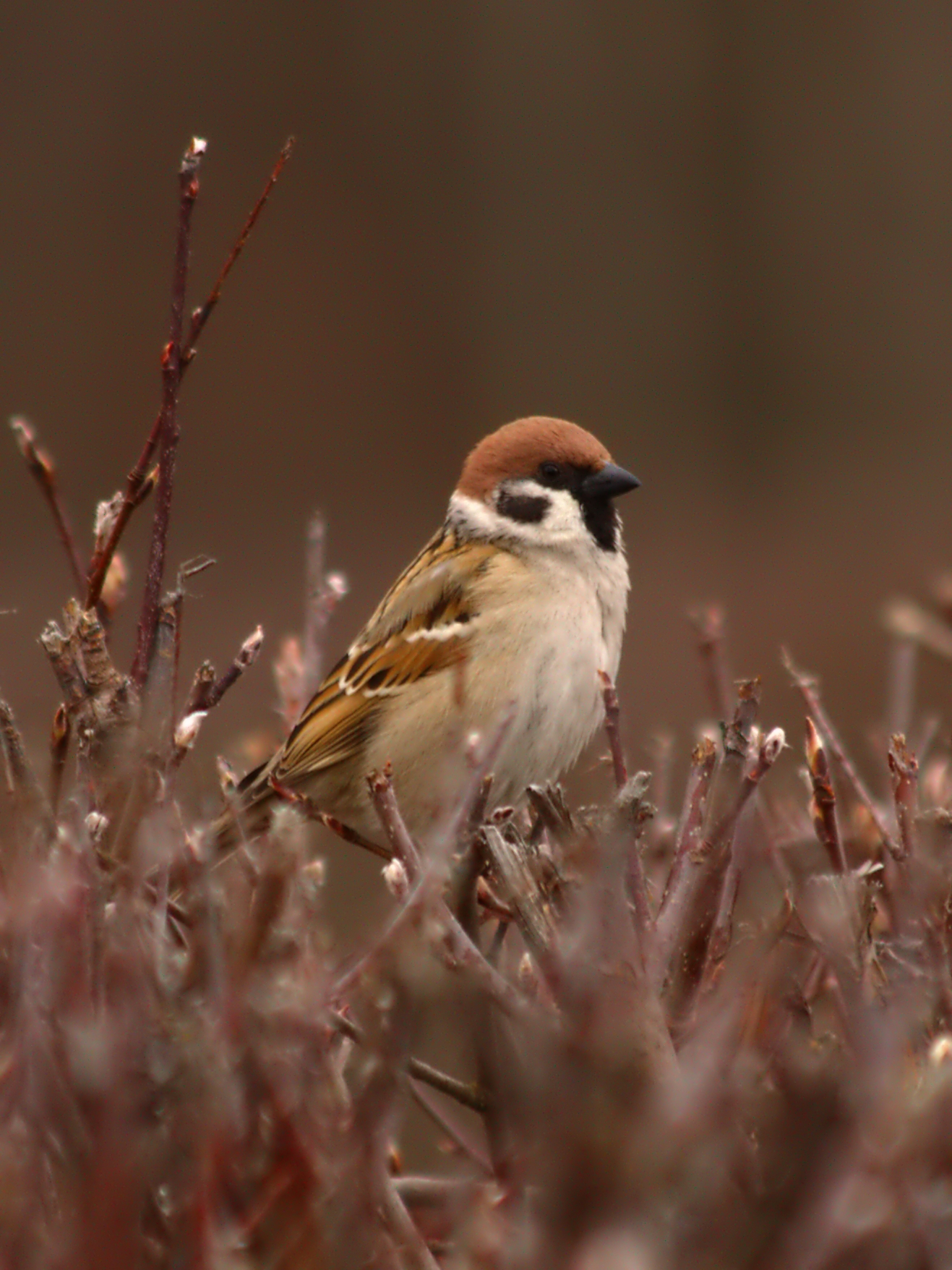 Pilfink (Passer montanus)